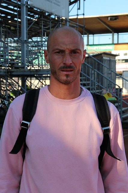 Matthias Morys (Lustenau)